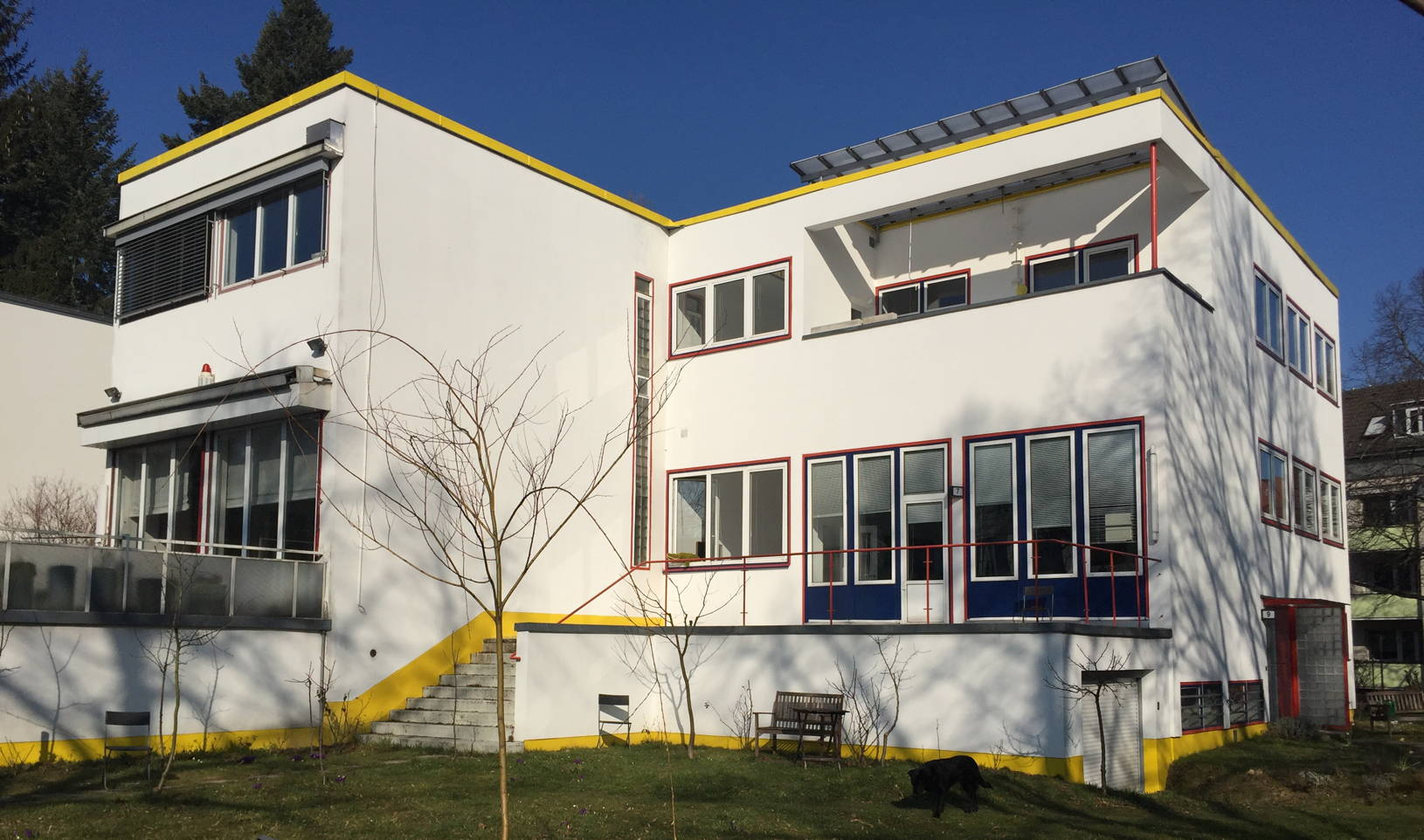 Doppelwohnhaus "Fritz Lang - Thea von Harbou", Schorlemerallee 7/7a, 14195 Berlin-Dahlem, Stahlskelettbau im Stil der "Neuen Sachlichkeit" (sog. "Bauhaus-Stil"), Fertigstellung 1929. Versuchssiedlung Schorlemerallee: Baubschnitt 1, in traditionellem Mauerwerk: zwei Baublöcke mit je sechs Reihenhäusern in doppelt gestaffelter Anordnung (Nr. 13, 13A, 15, 15A, 17, 17A sowie 19, 19A, 21, 21A, 23, 23A) Baubschnitt 2, in patentiertem Stahlskelett: das Atelierhaus (Nr.17B) der Architekten, das abgebildete Doppelhaus (Nr. 7/7a -die Nr.7 heute Spilstr.9-) sowie zwei frei stehende Häuser (Nr. 9 und 11). Baubschnitt 3, in modernem Stahlbeton: Baublock mit vier Reihenhäusern (Nr.12, 12A, 12B, 12C)